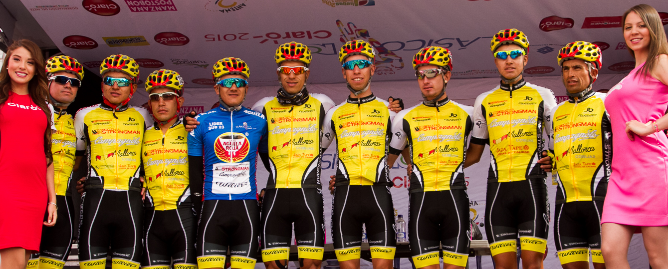 Equipo Strongman-Campanolo-Wilier Temporada 2015